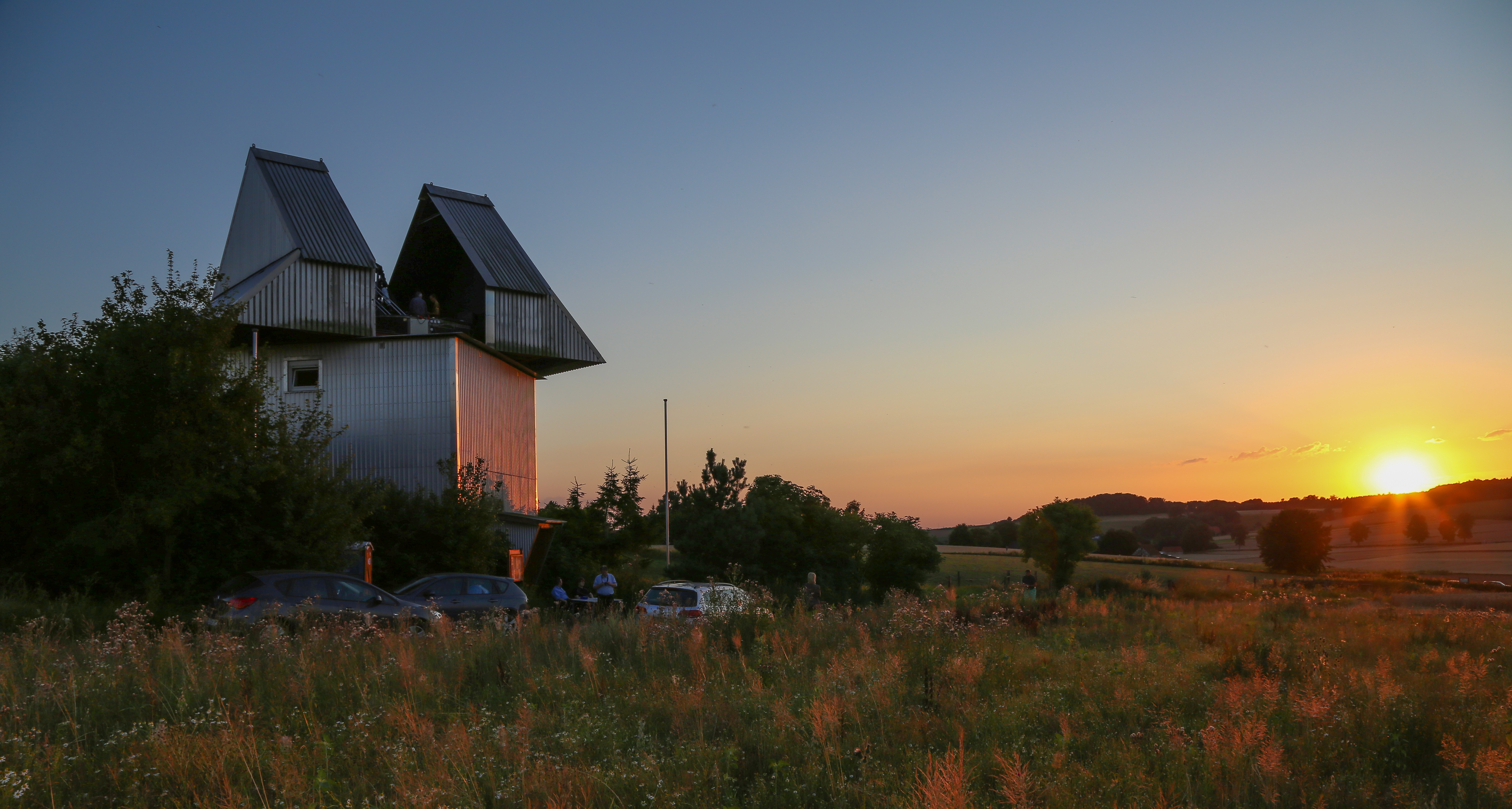 Die EXPO-Sternwarte Melle bei Sonnenuntergang.